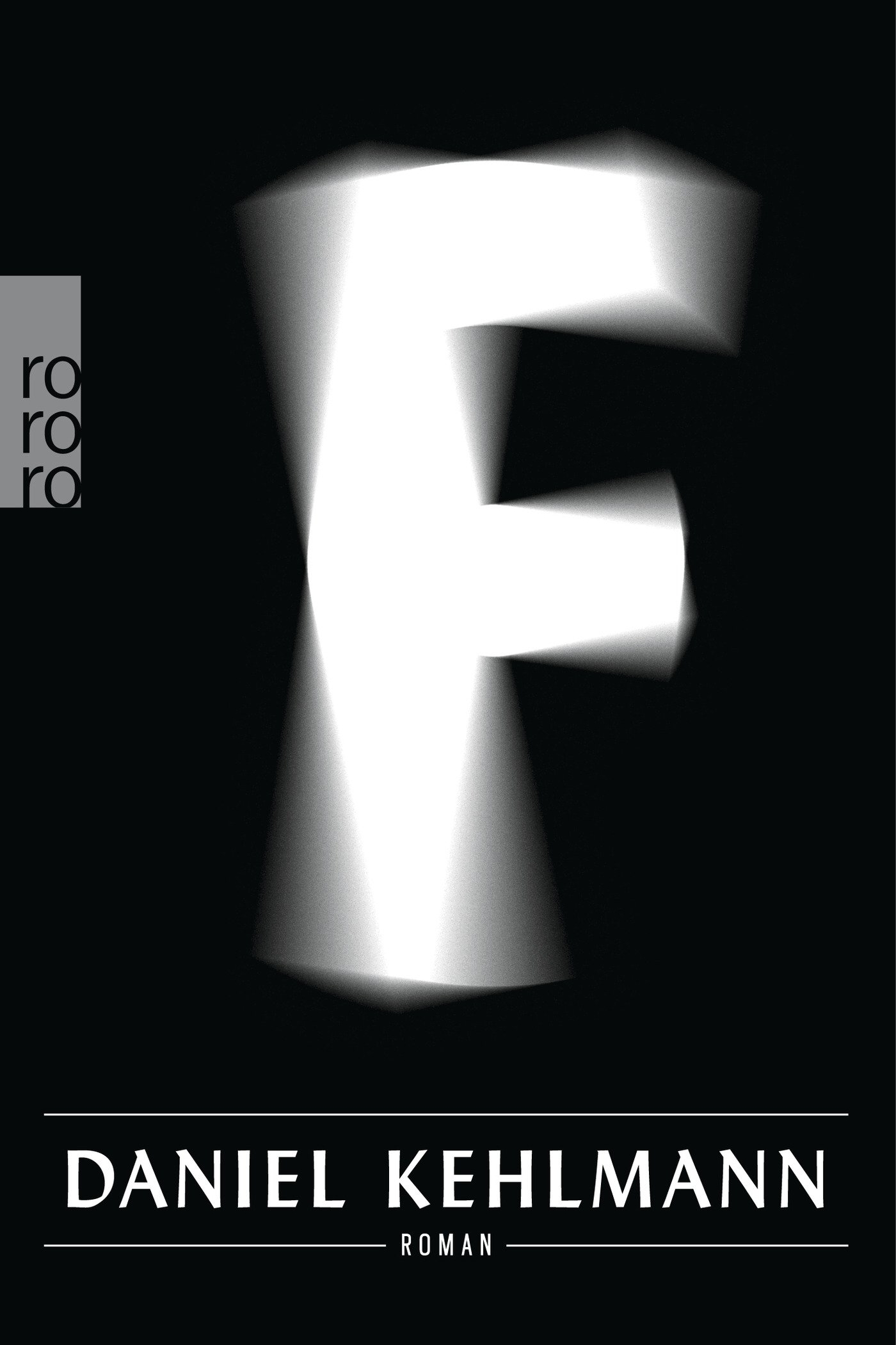 Daniel Kehlmann: F. Rowohlt Taschenbuch Verlag 2014, ISBN 9783499249273.